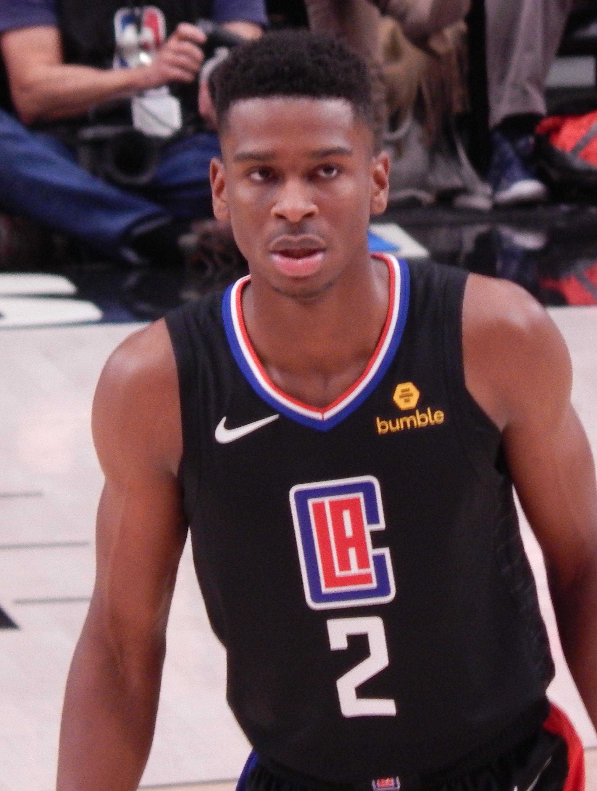 Shai Gilgeous-Alexander #2 of the Los Angeles Clippers against the Portland Trail Blazers on November 8, 2018 at Moda Center in Portland, Oregon.